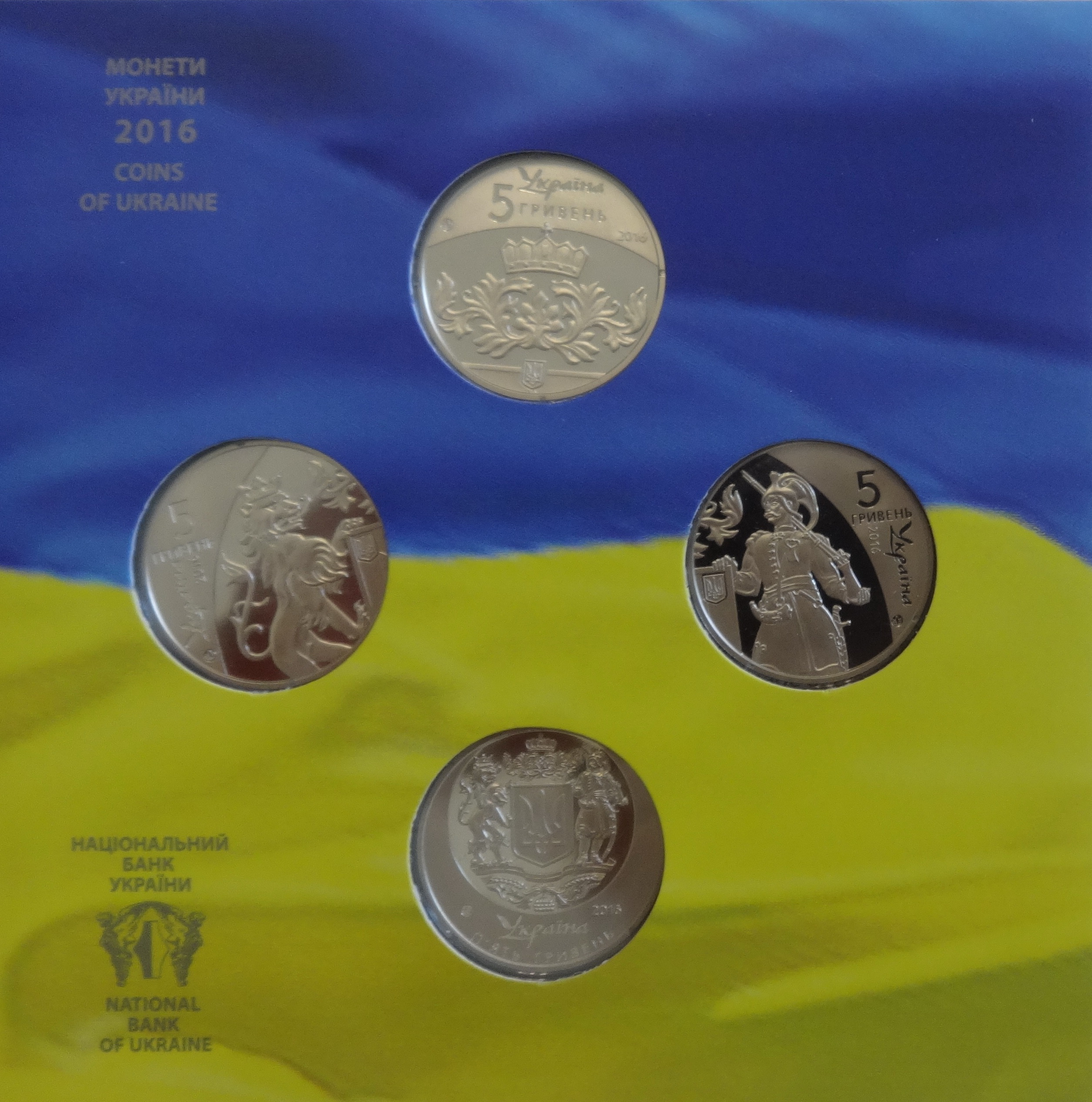 Набір монет НБУ «25 років незалежності України». Реверс монет.